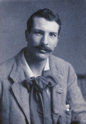 Artist James Herbert McNair (1868-1955)